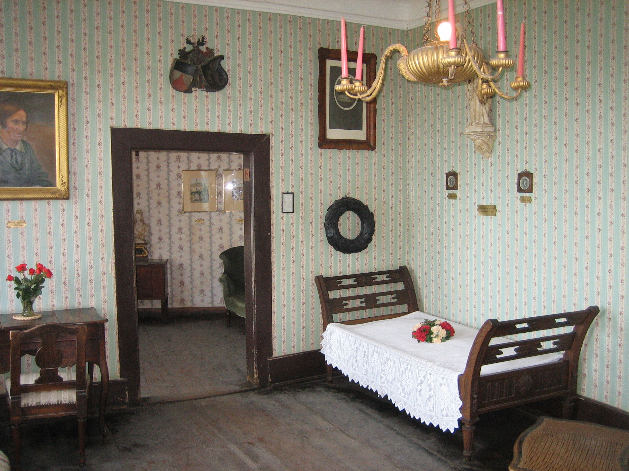 Annette von Droste-Hülshoffs Sterbezimmer in der Burg Meersburg